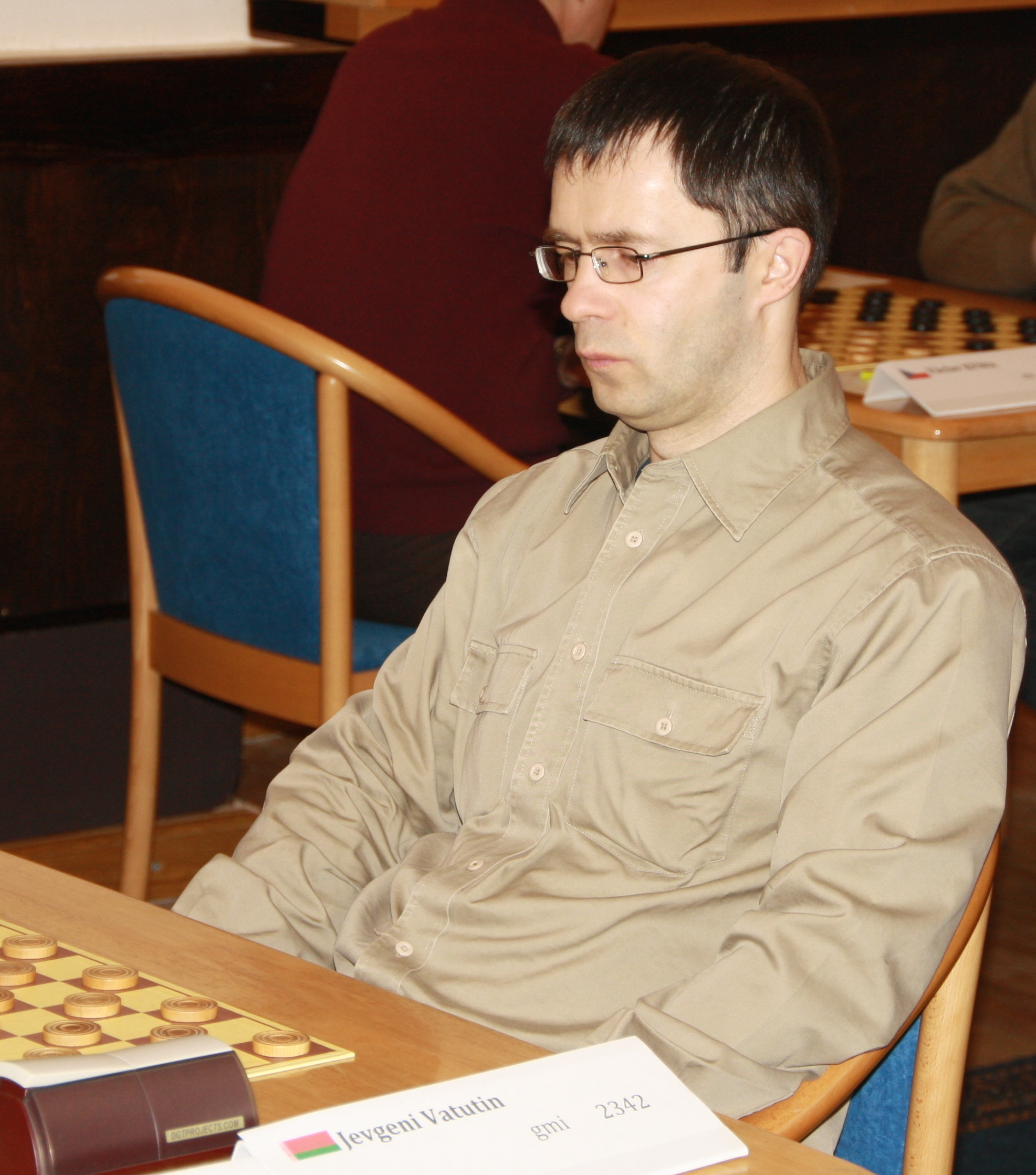 Jevgeni Vatutin Euroopa rahvusvahelise kabe võistkondlikel meistrivõistlustel Tallinna Malemajas